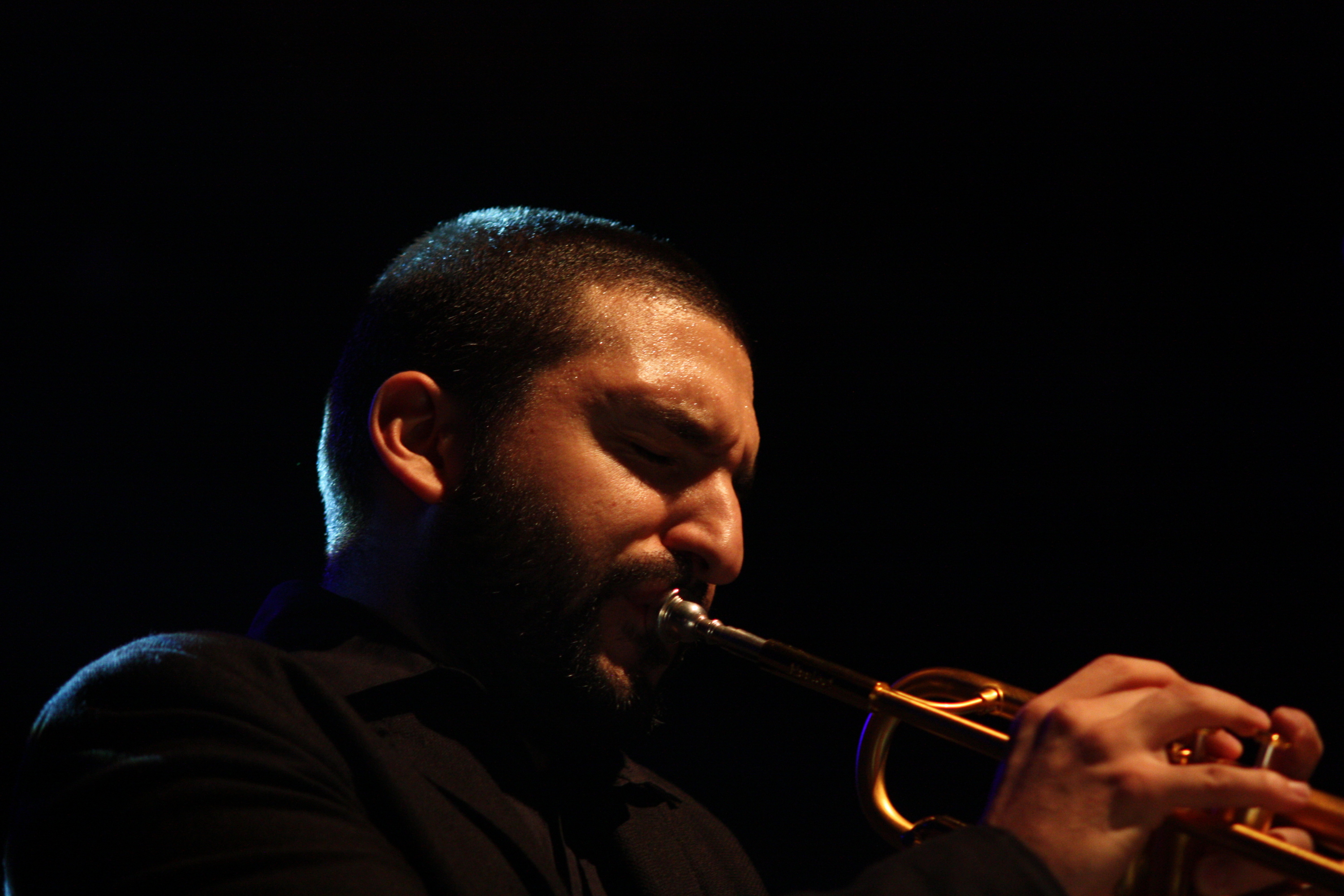 44. Deutsches Jazzfestival Frankfurt 2013: Ibrahim Maalouf mit der hr-Bigband